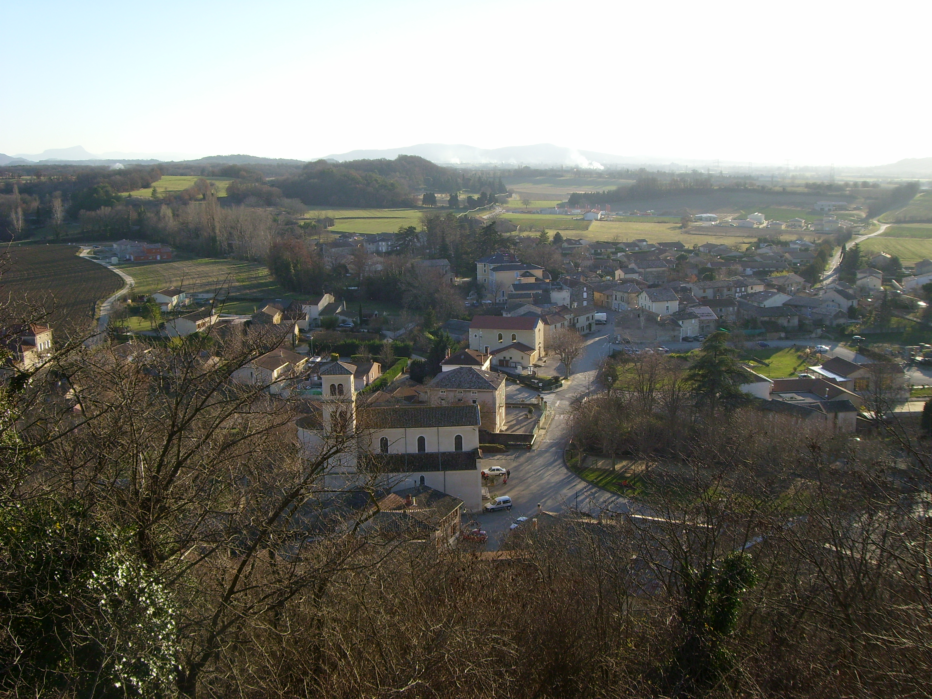 Vue de Montvendre (Drôme) depuis le calvaire